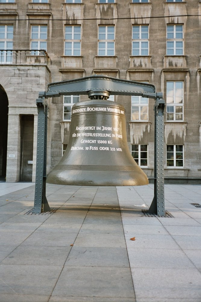 Glocke Bochumer Verein Rathaus Bochum aus dem Jahr 1867 anläßlich der Pariser Weltausstellung